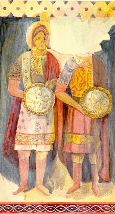 Средний Зеленчукский храм - Фреска